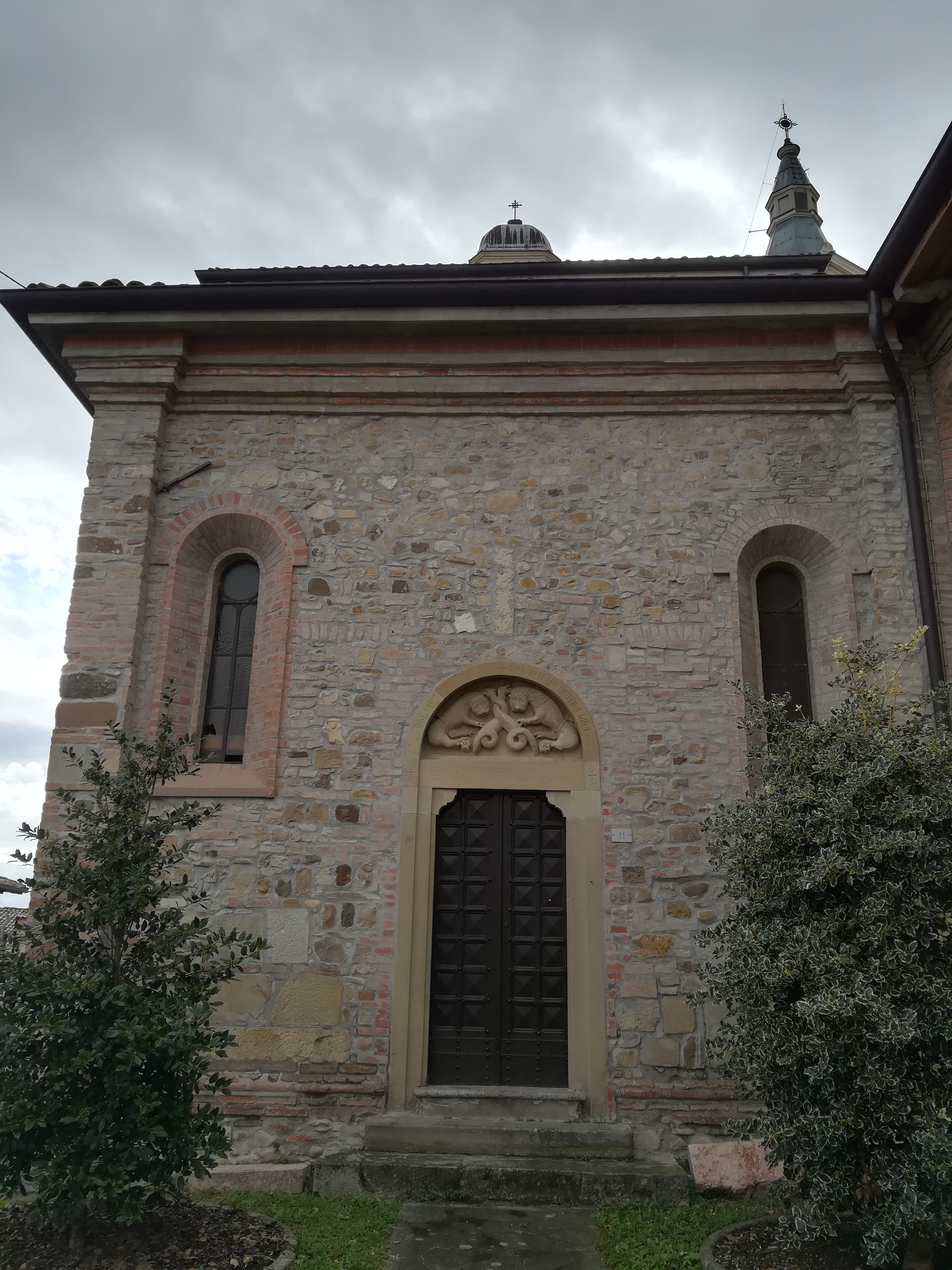 Traversetolo